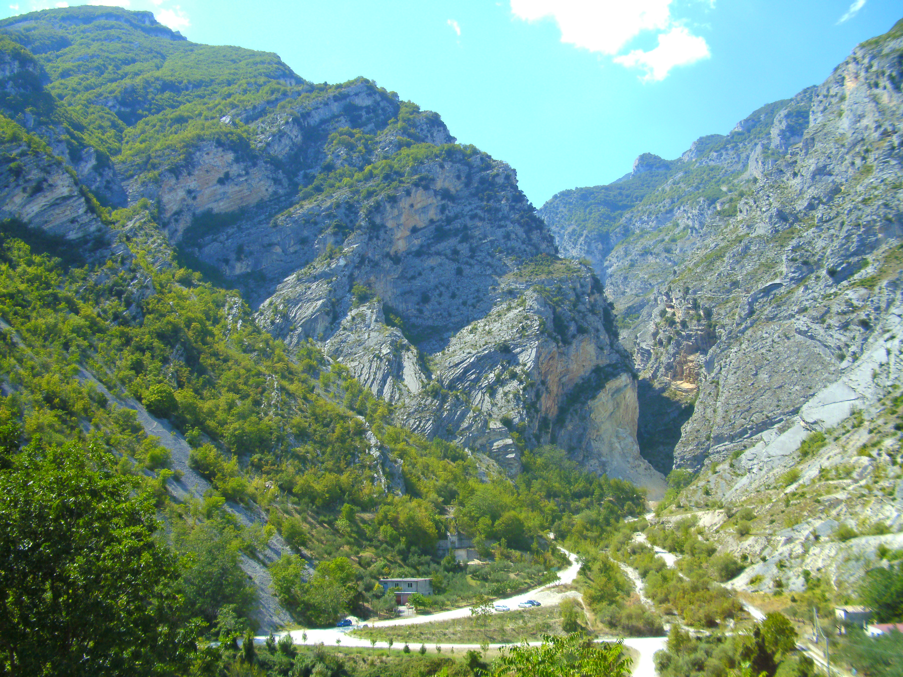 Gole di Fara San Martino, Riserva naturale Fara San Martino Palombaro, Abruzzo, Italia.